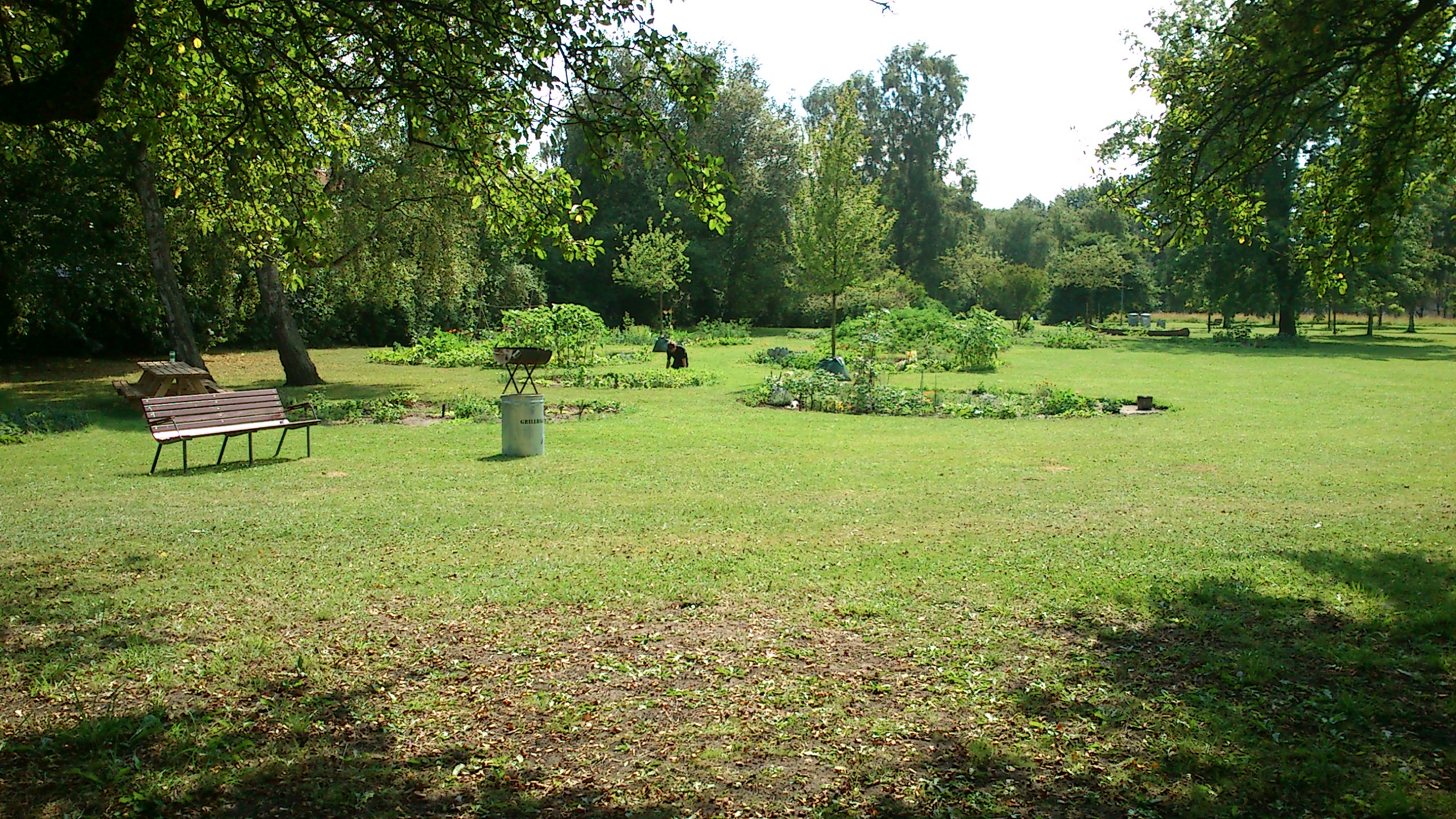 Marselisborg Hospitalspark. Ved køkkenhaverne i nord.